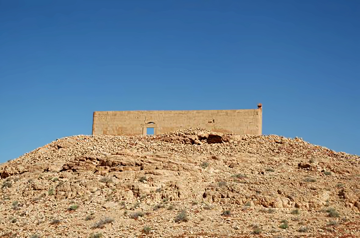 Das Kleinkastell Gasr Banat, auch Gasr Isawi, ist ein ehemaliges römisches Militärlager, dessen Besatzung für Sicherungs- und Überwachungsaufgaben am rückwärtigen Limes Tripolitanus in der römischen Provinz Africa proconsularis, später Tripolitania zuständig war. Blick aus Südosten auf das überhöht liegende Kleinkastell.